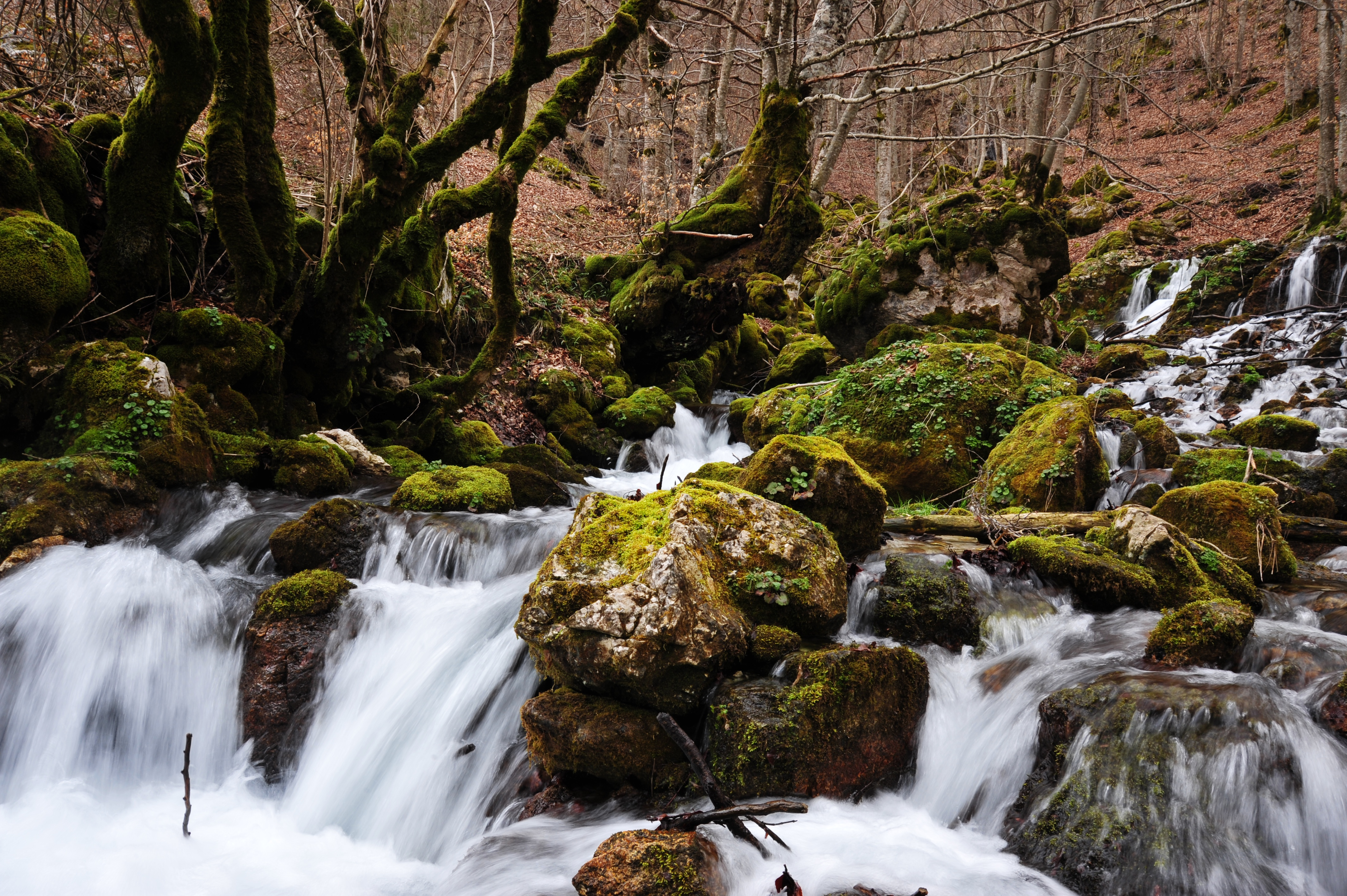 Val Fondillo This is a photo of a monument which is part of cultural heritage of Italy.